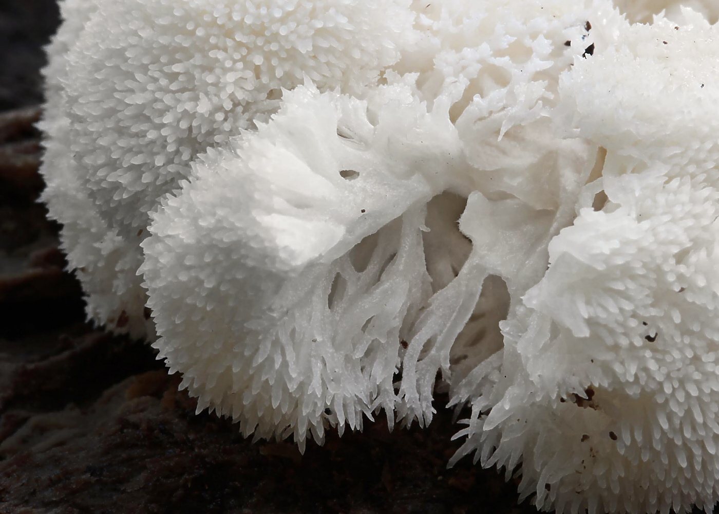 Hericium erinaceus (Bull.) Pers.